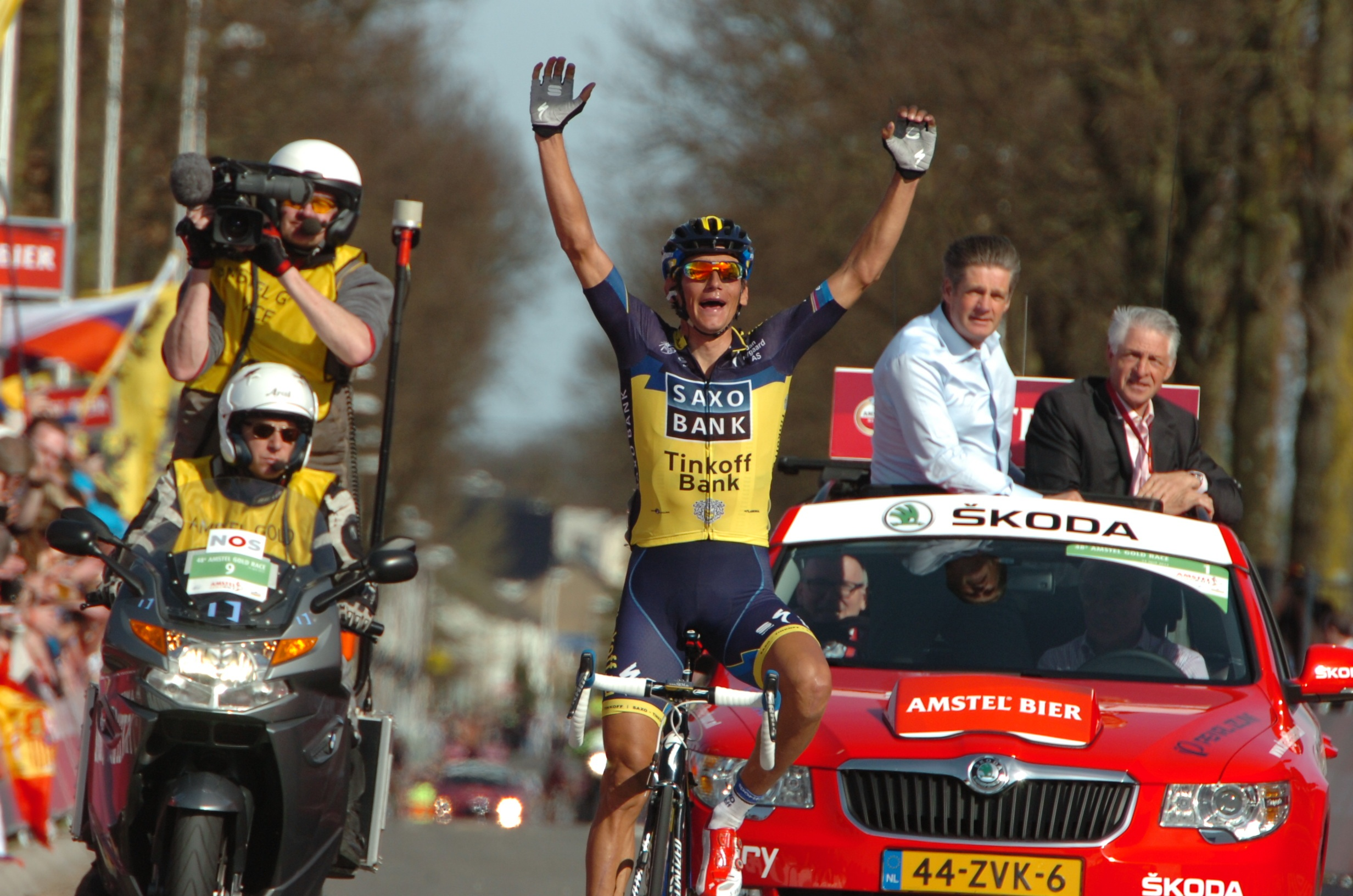 Roman Kreuziger celebrando su victoria en la Amstel Gold Race en 2013.